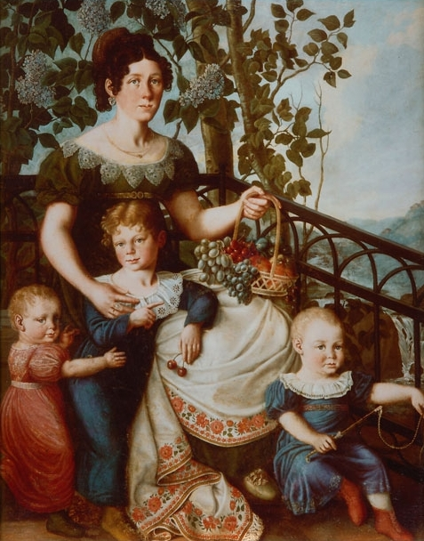 Sophie Amalie Seydewitz, née Müller (1792-1863) with Carl, Johan, and Charlotte Seydewitz